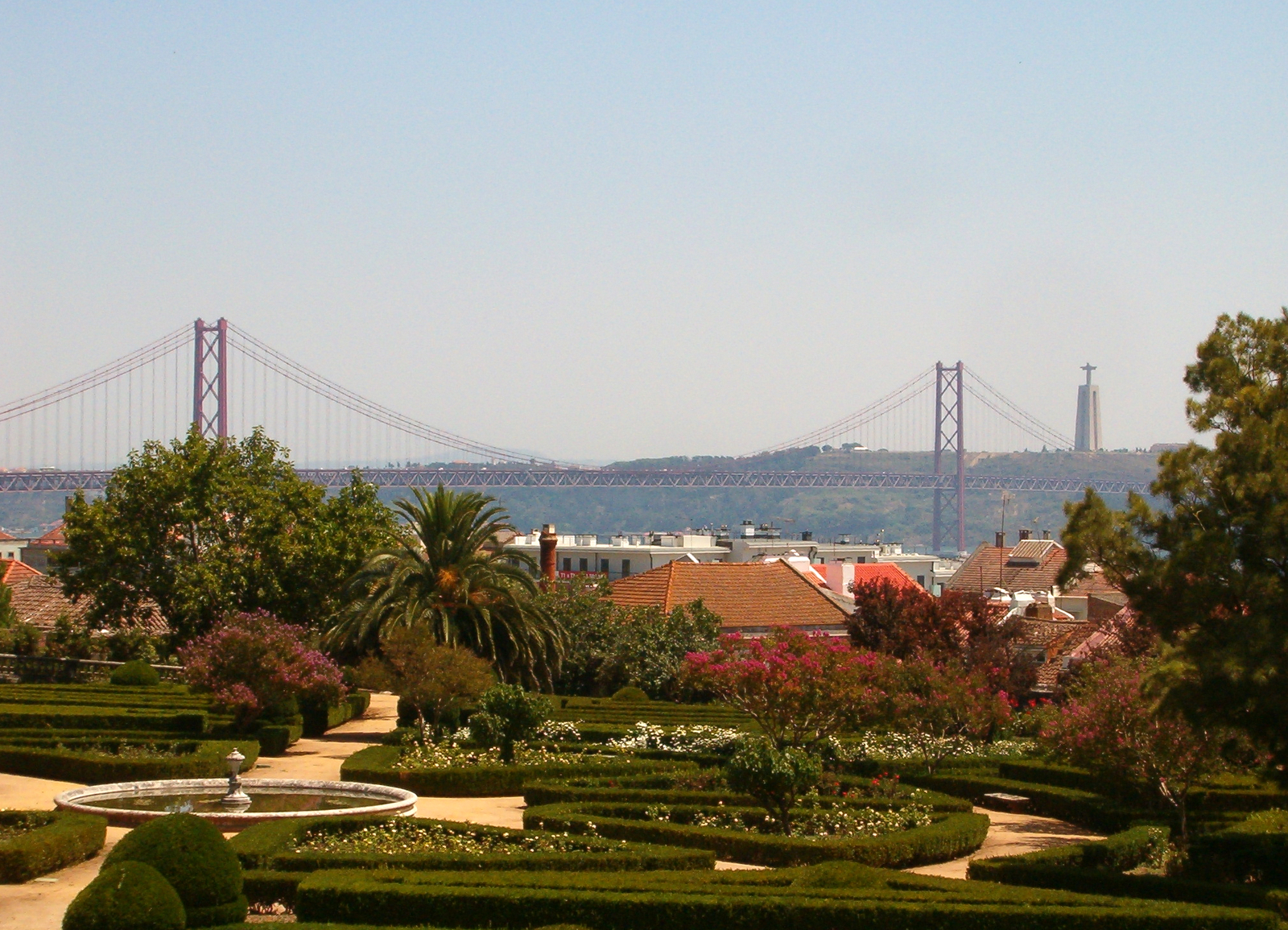 Ponte 25 de Abril em Lisboa